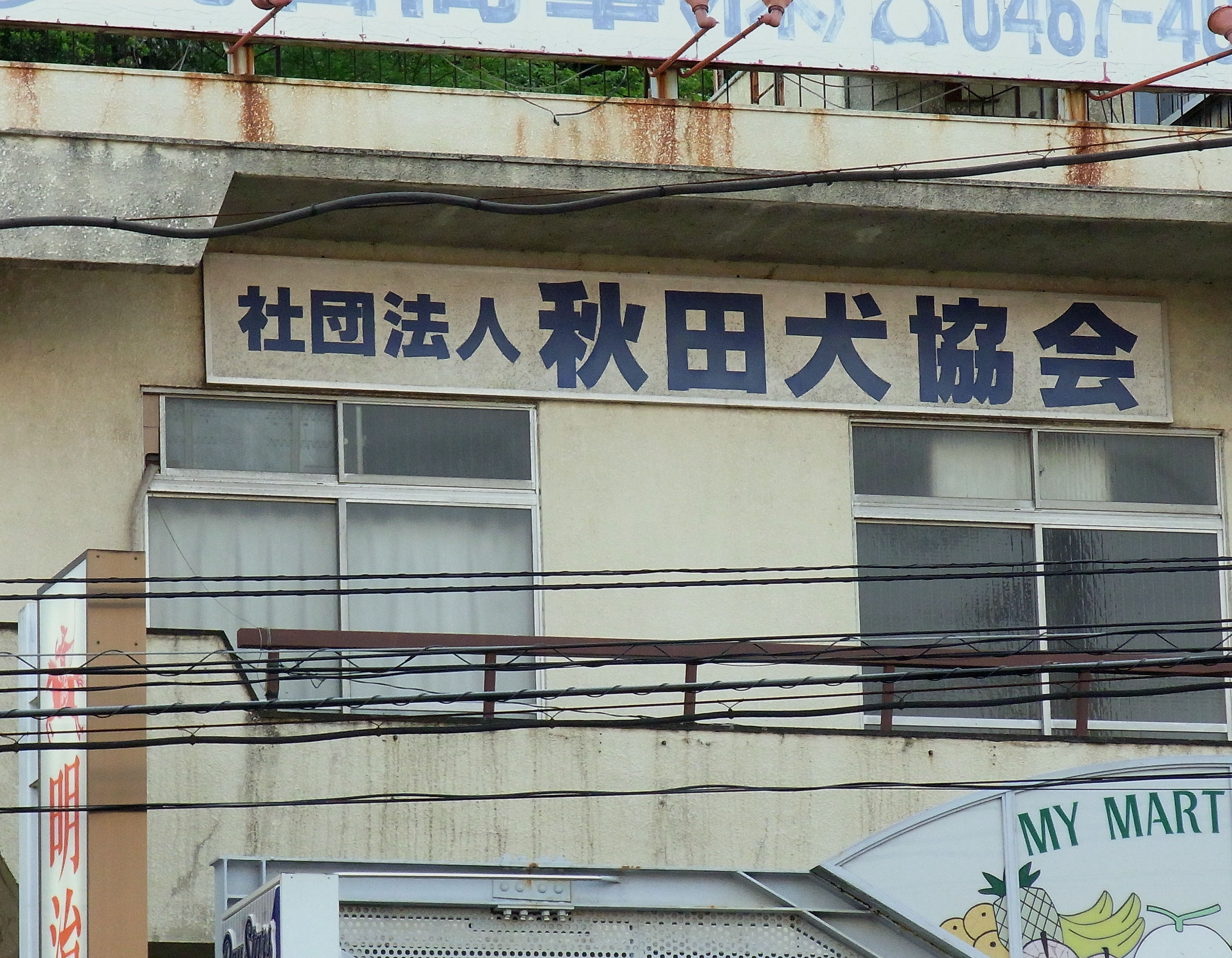 秋田犬協会。鎌倉市岡本1-1-1。 Ricoh CX1